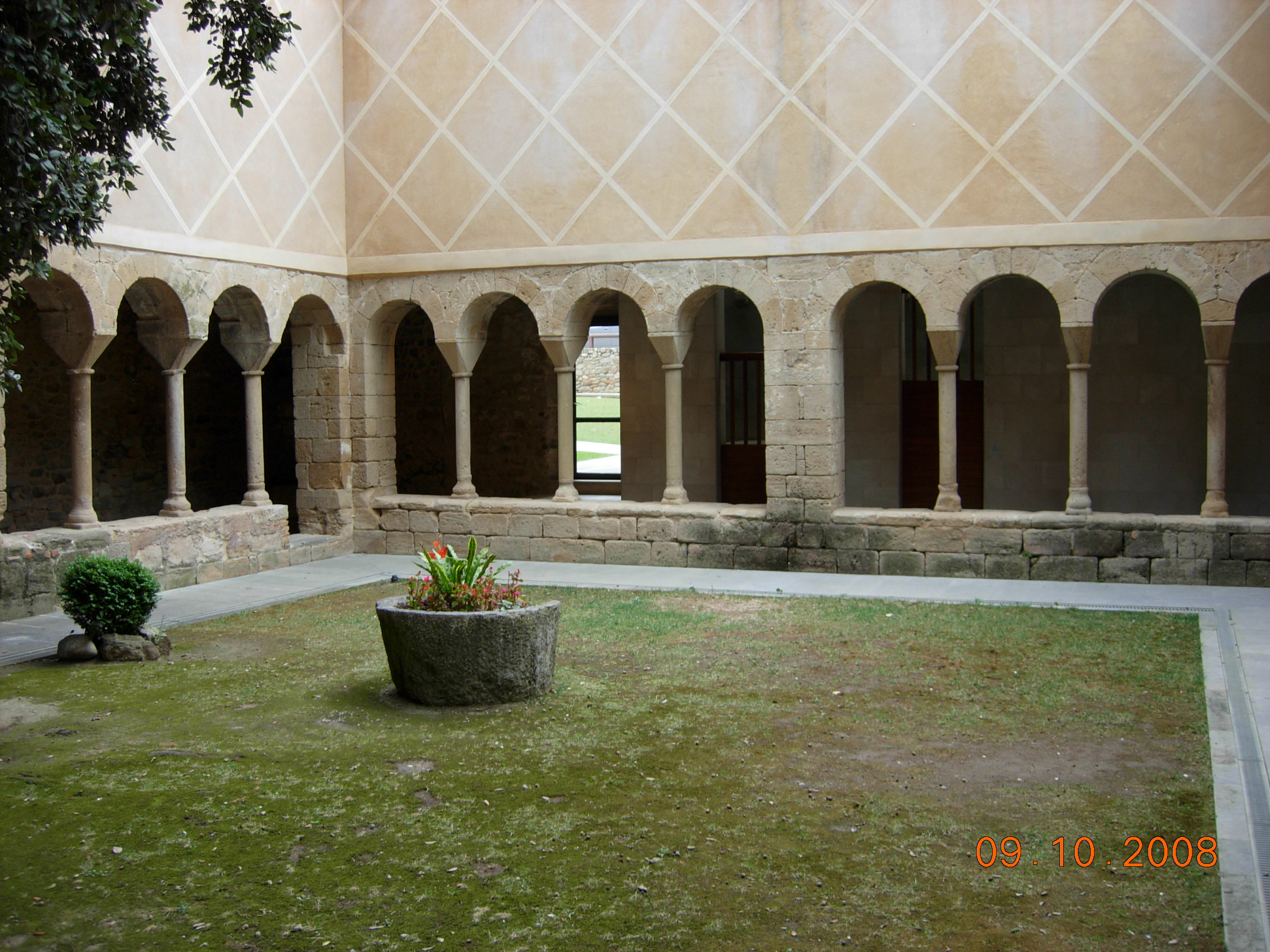 claustre part romànica